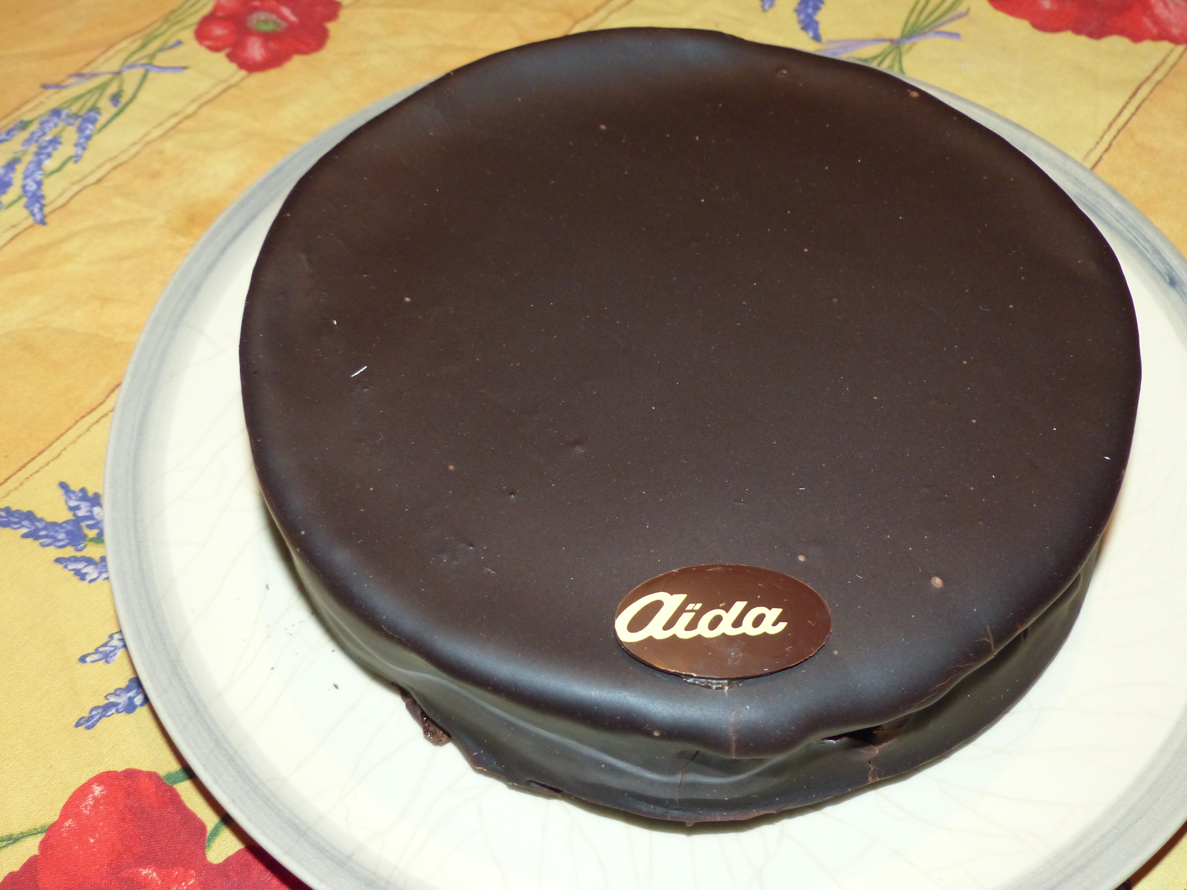 Sachertorte, Wien (Bäckerei Aida)